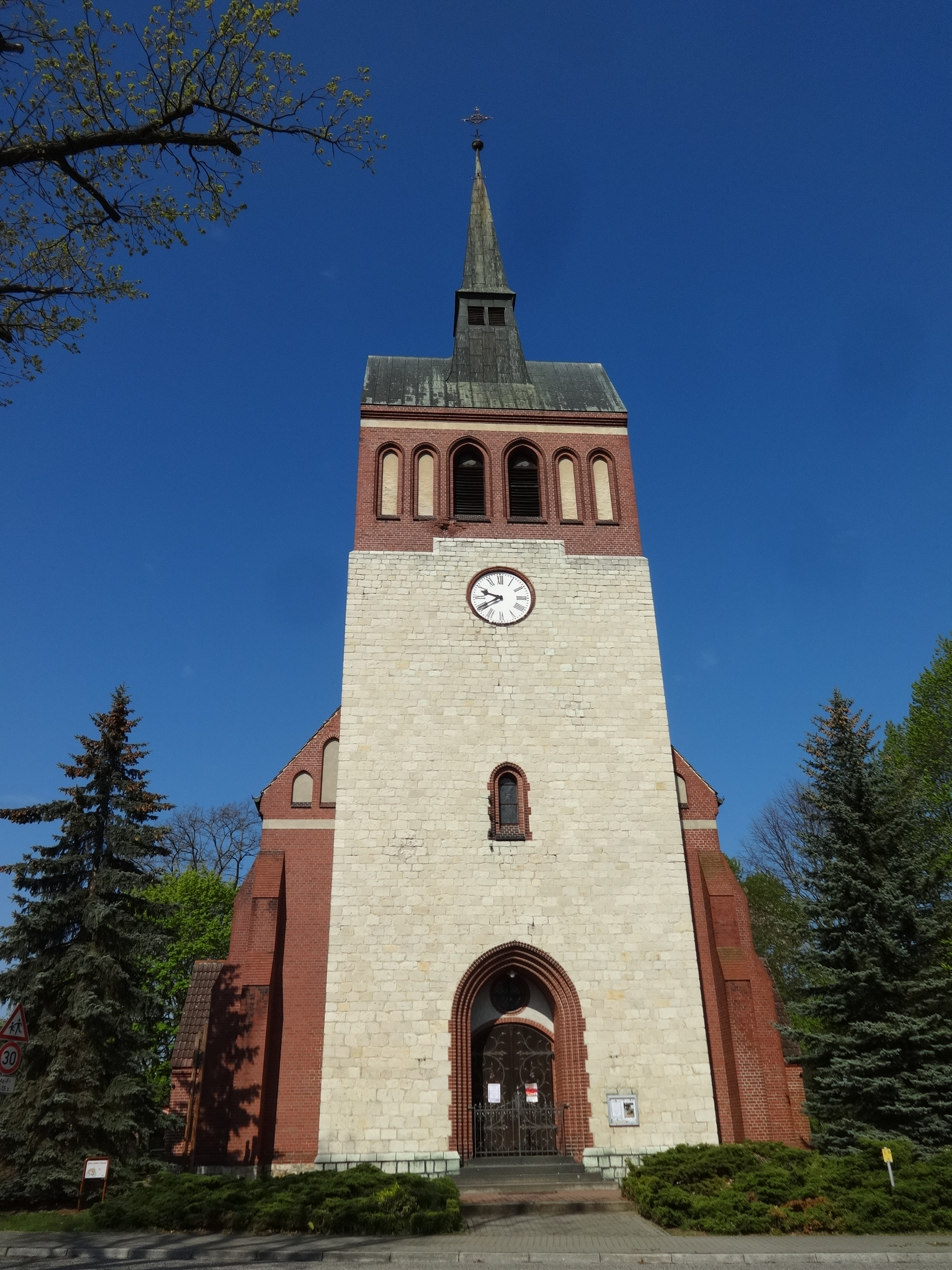 Die evangelische Dorfkirche Markgrafpieske ist eine dreischiffige Hallenkirche in Spreenhagen, Landkreis Oder-Spree in Brandenburg. Das Bauwerk entstand unter der Leitung des Regierungsbaumeisters Schlaeger in den Jahren 1896 bis 1898. Im Innern befindet sich eine Ausstattung aus der Bauzeit der Kirche, darunter eine Sauer-Orgel.